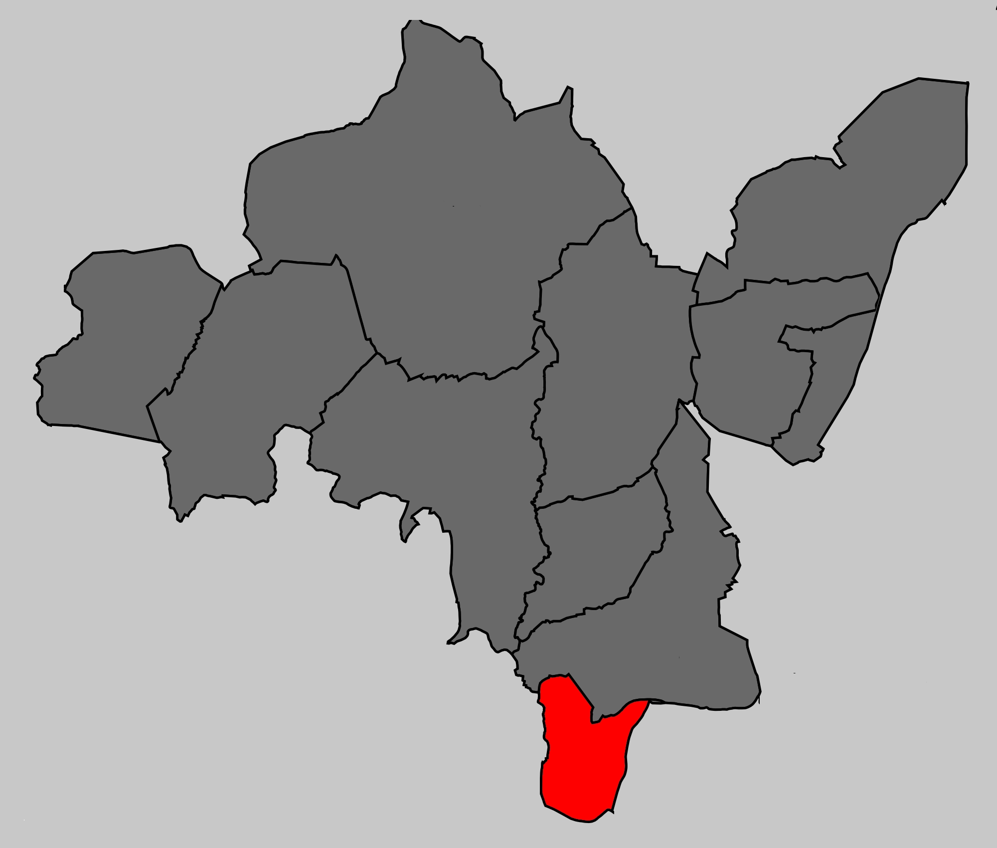 Localização de Pedrouços na Maia.